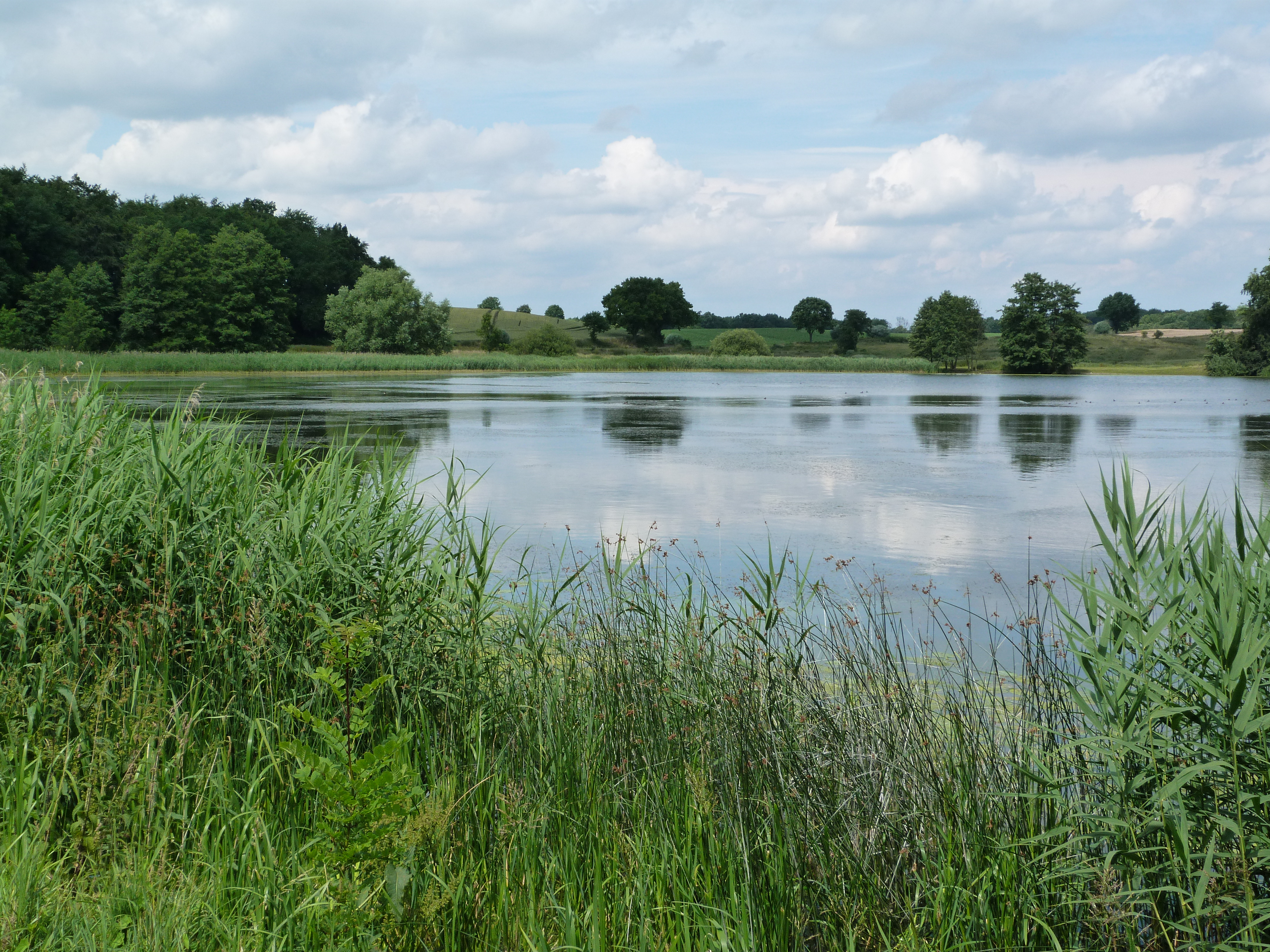 Blick auf den Goldensee, dem Naturschutzgebiet und grenzliche Trennung zwischen dem Herzogtum Lauenburg und Nordwestmecklenburg.